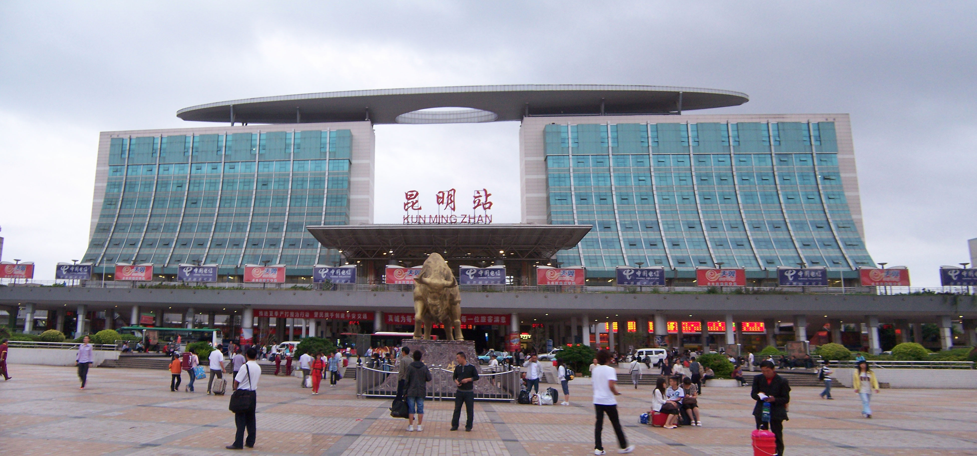 昆明站